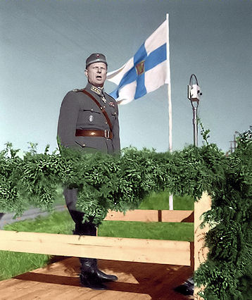 Jatkosodan 3. Prikaatin komentaja eversti Lauri Haanterä